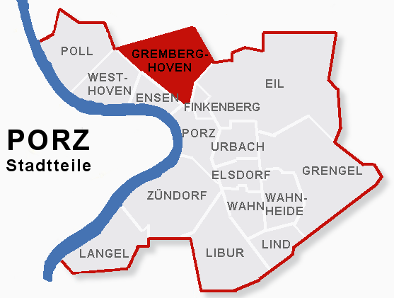 Lage des Stadtteils Gremberhoven im Stadtbezik Porz